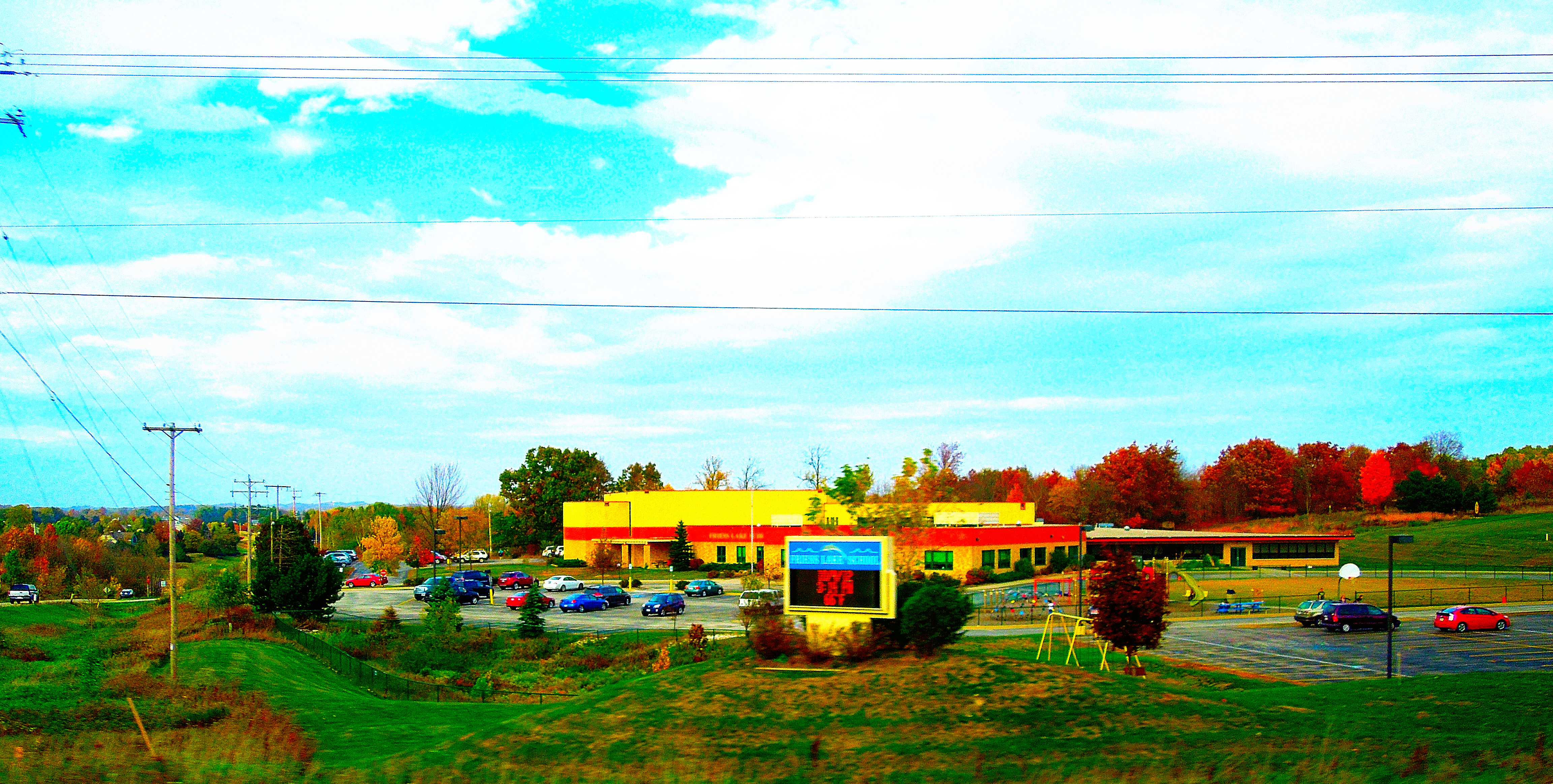 Friess Lake School